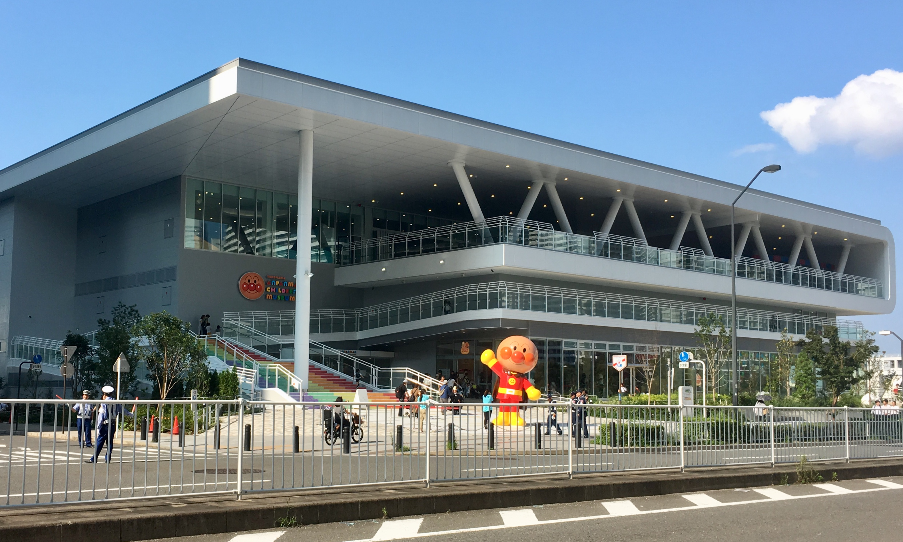 2019年に移転リニューアルオープンした横浜アンパンマンこどもミュージアムの外観。